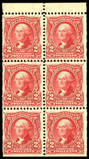 1902 2-cent stamp booklet